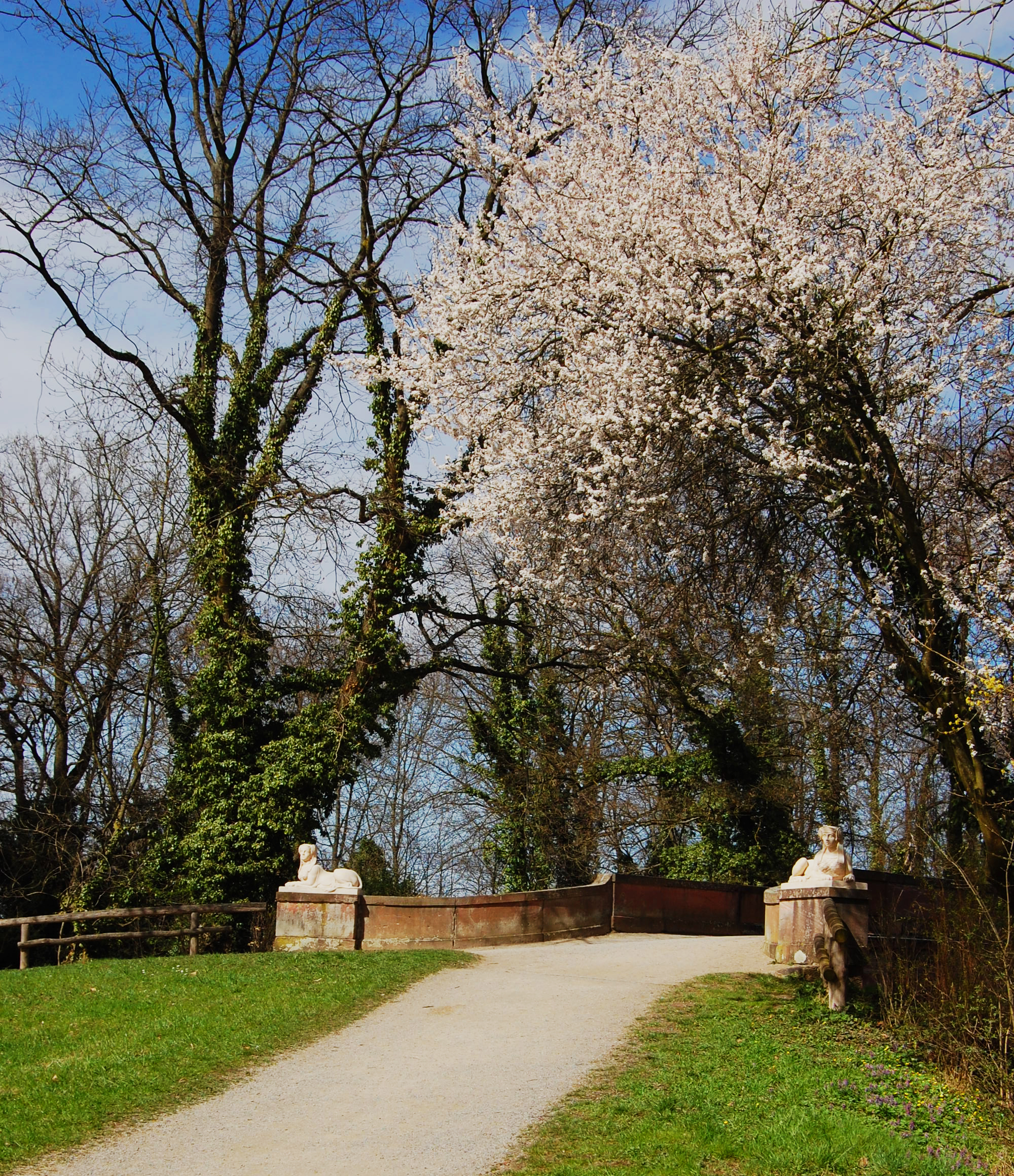 Tzw. kamienny mostek